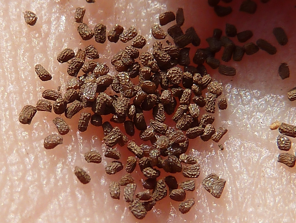 Nicotiana glauca (Gandul) : Simientes inframilimétricas, subpoliédricas redondeadas y reticuladas - Rambla del Charco, Águilas (Murcia, España).